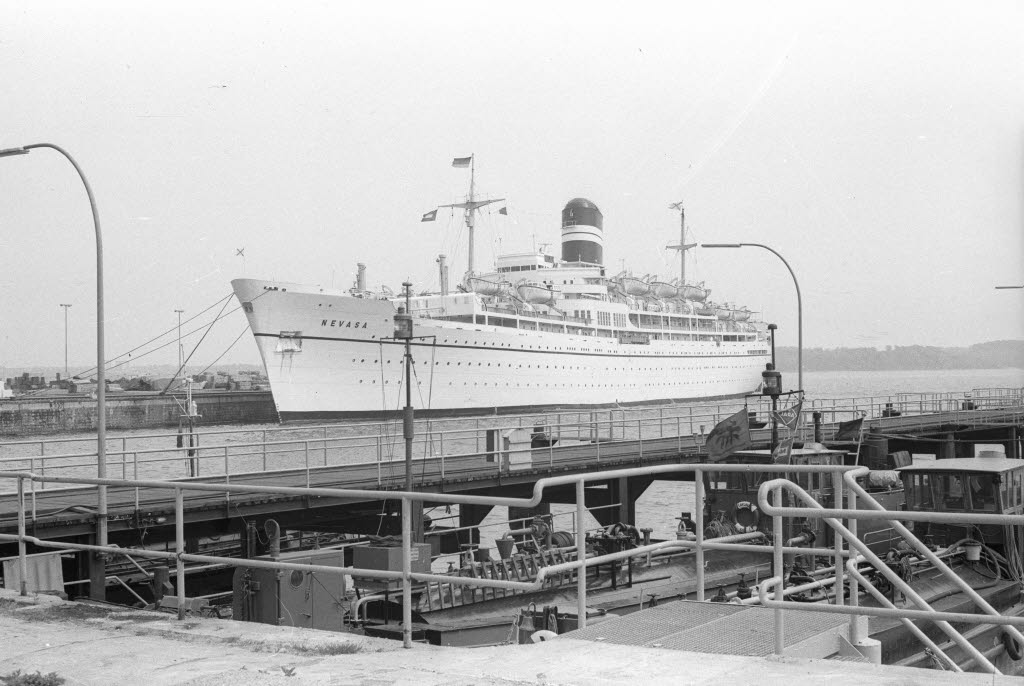 Das größte Passagierschiff, das Kiel nach dem Krieg angelaufen hat, wurde vom Truppentransporter zur "schwimmenden Schule" für britische Schulklassen umgewandelt.